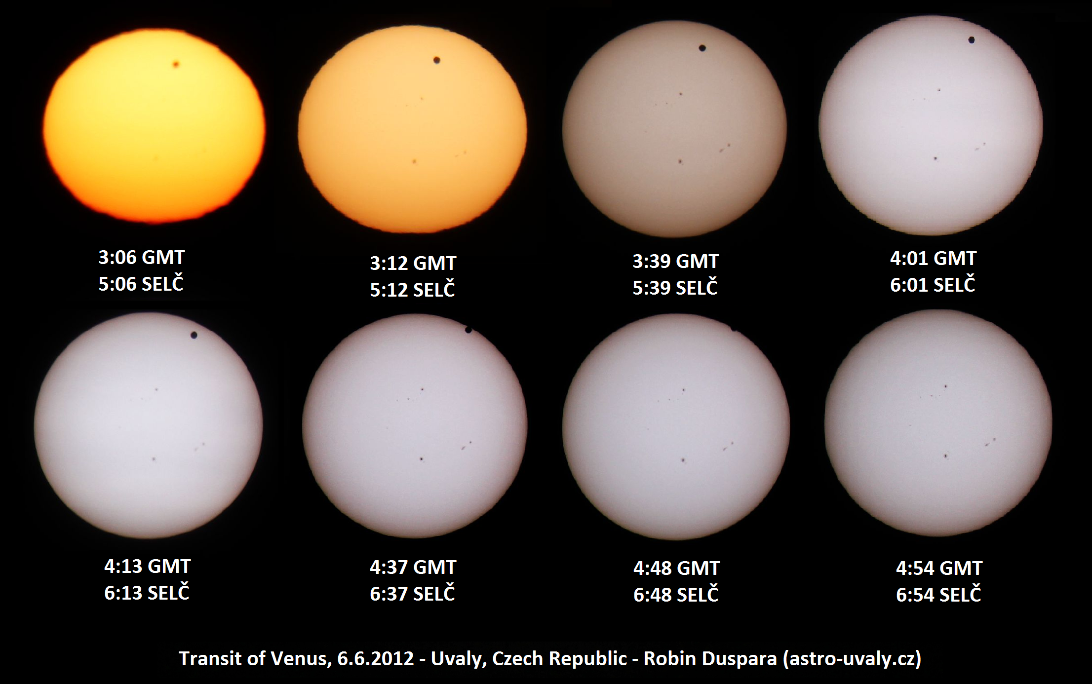 Přechod Venuše přes sluneční disk 2012